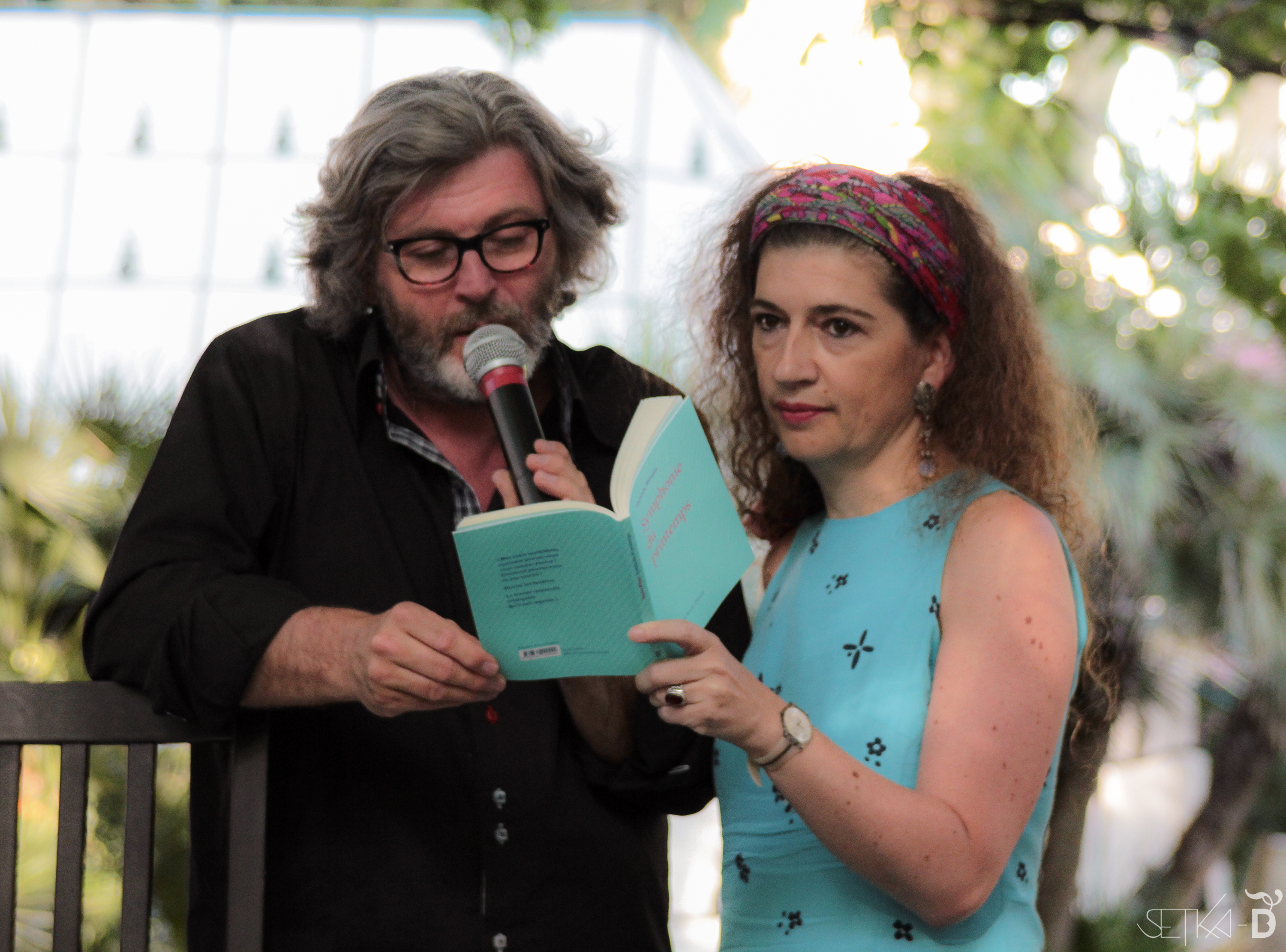 Lecture du poète grec Yannis Ritsos, Festival de Sète Voix vives de Méditerranée en Méditerranée